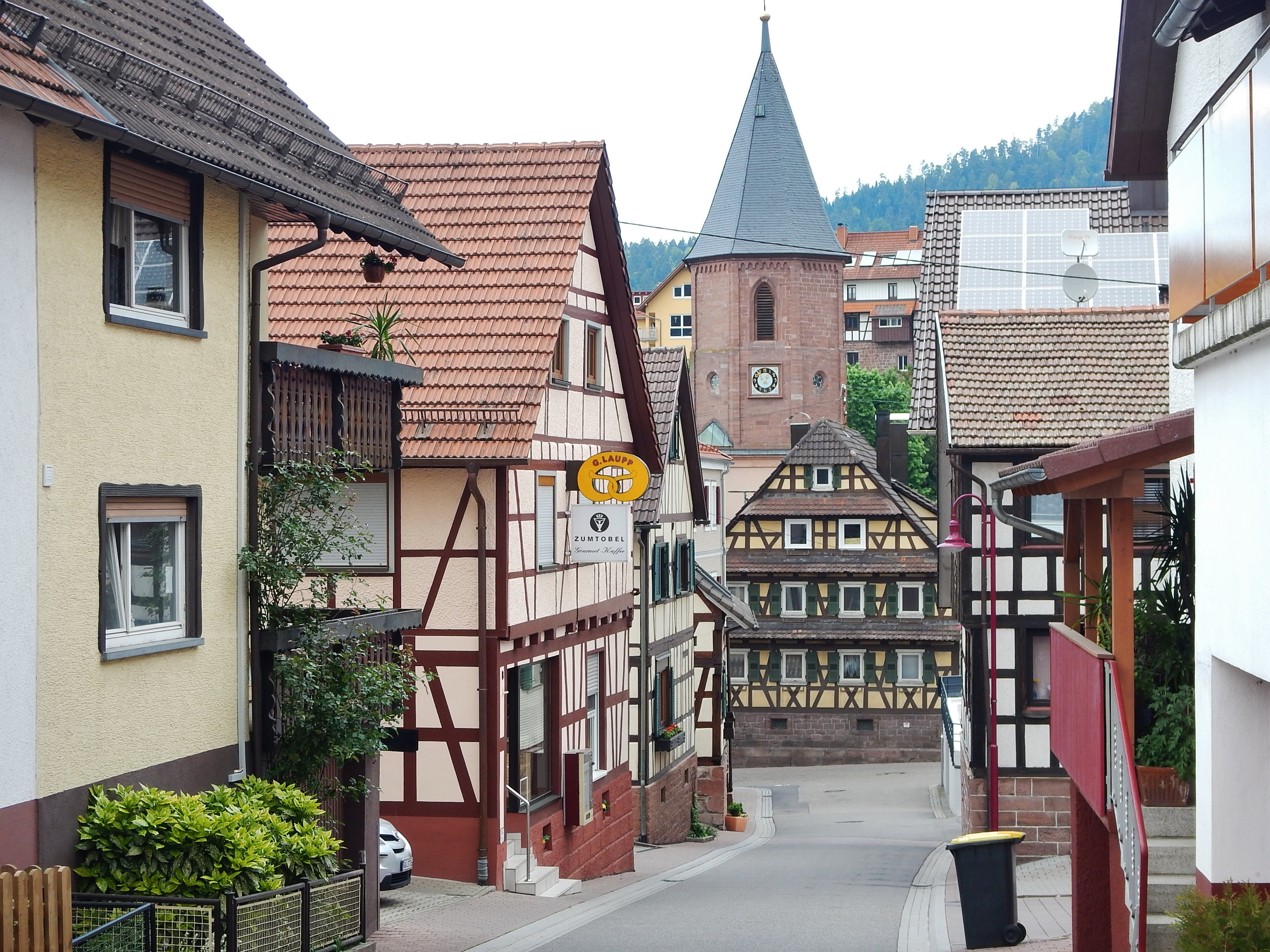 Loffenau mit Bäckerei Laupp